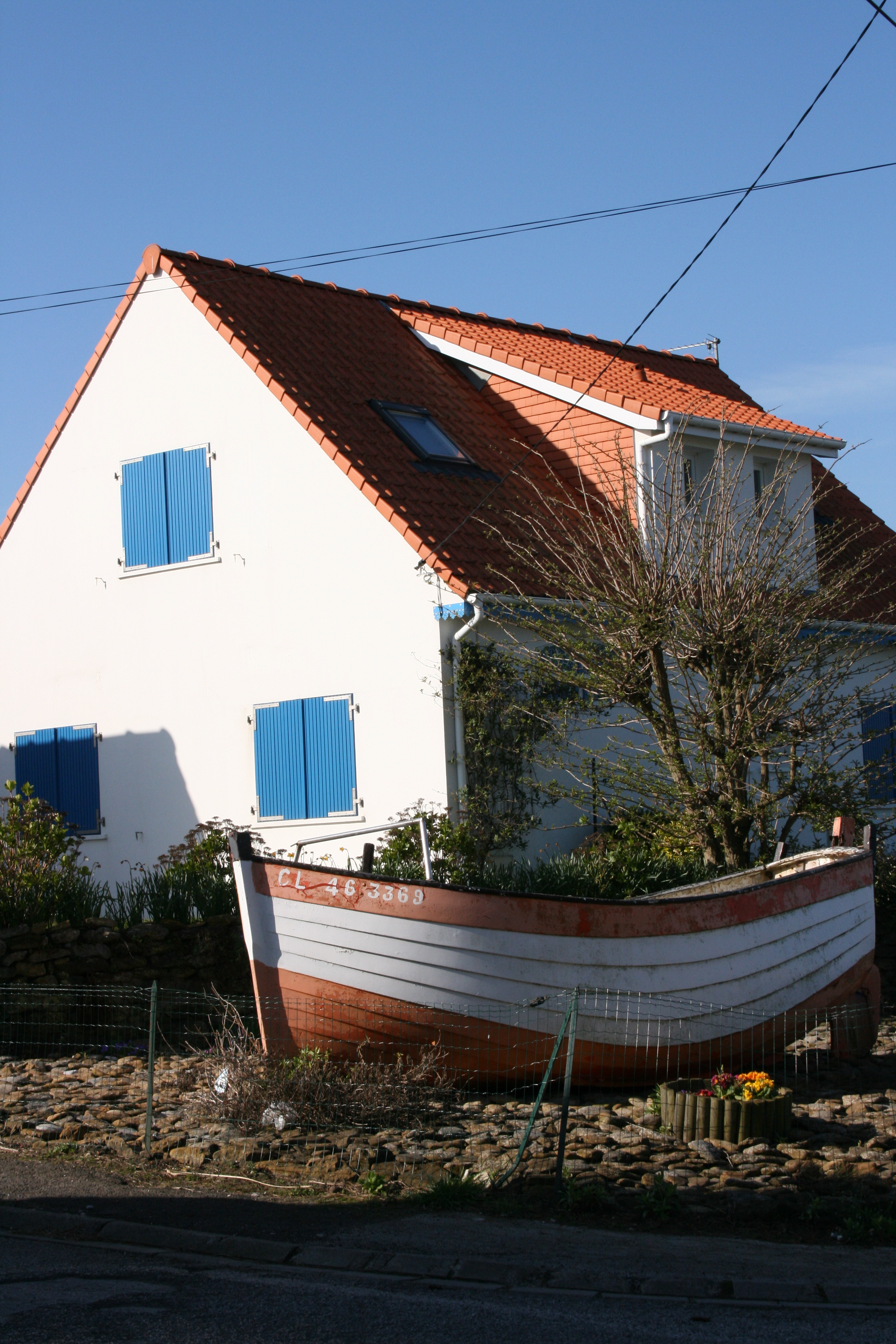 Flobart à Audresselles. Département du Pas-de-Calais, France